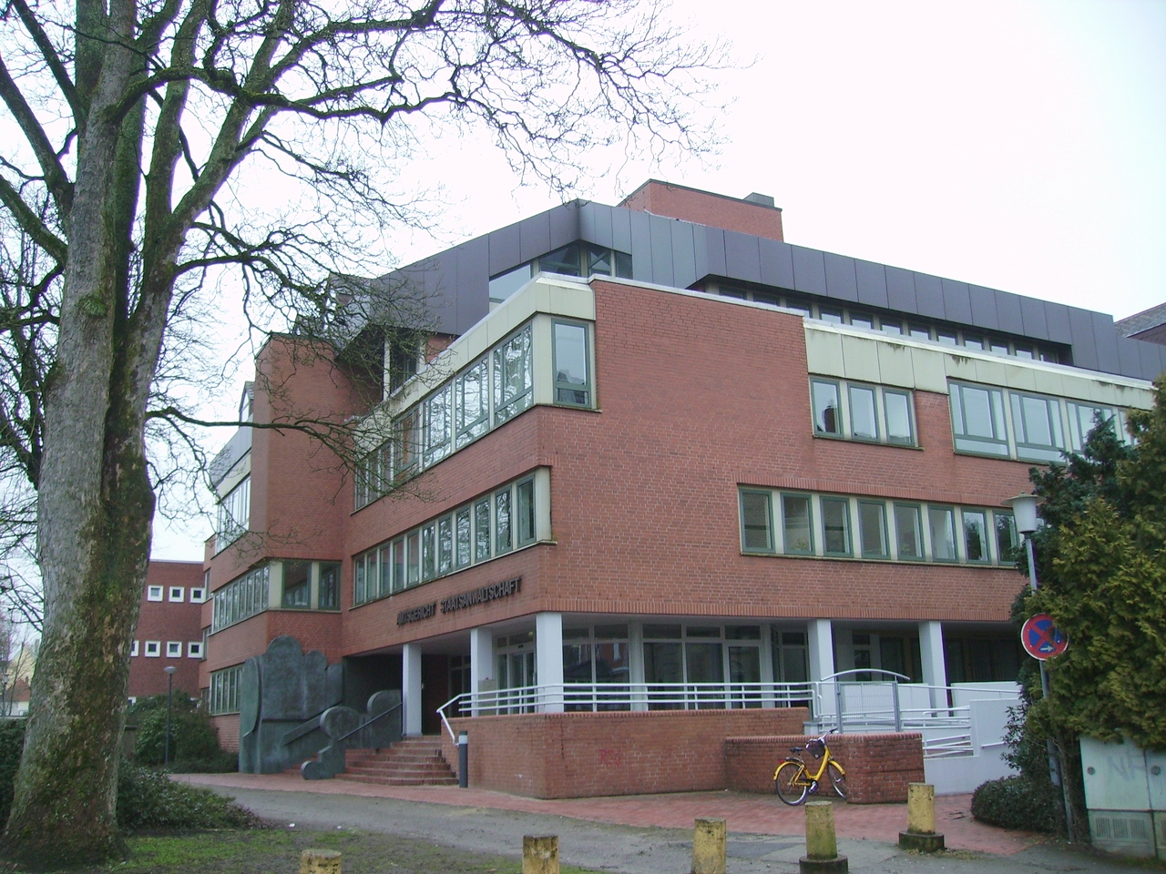 Das Gebäude des Amtsgerichts und der Staatsanwaltschaft in Verden (Aller)